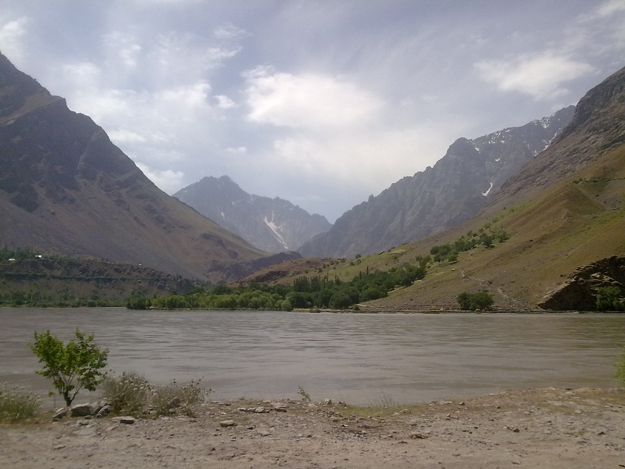 Трасса Хорог-Душанбе, река Пяндж